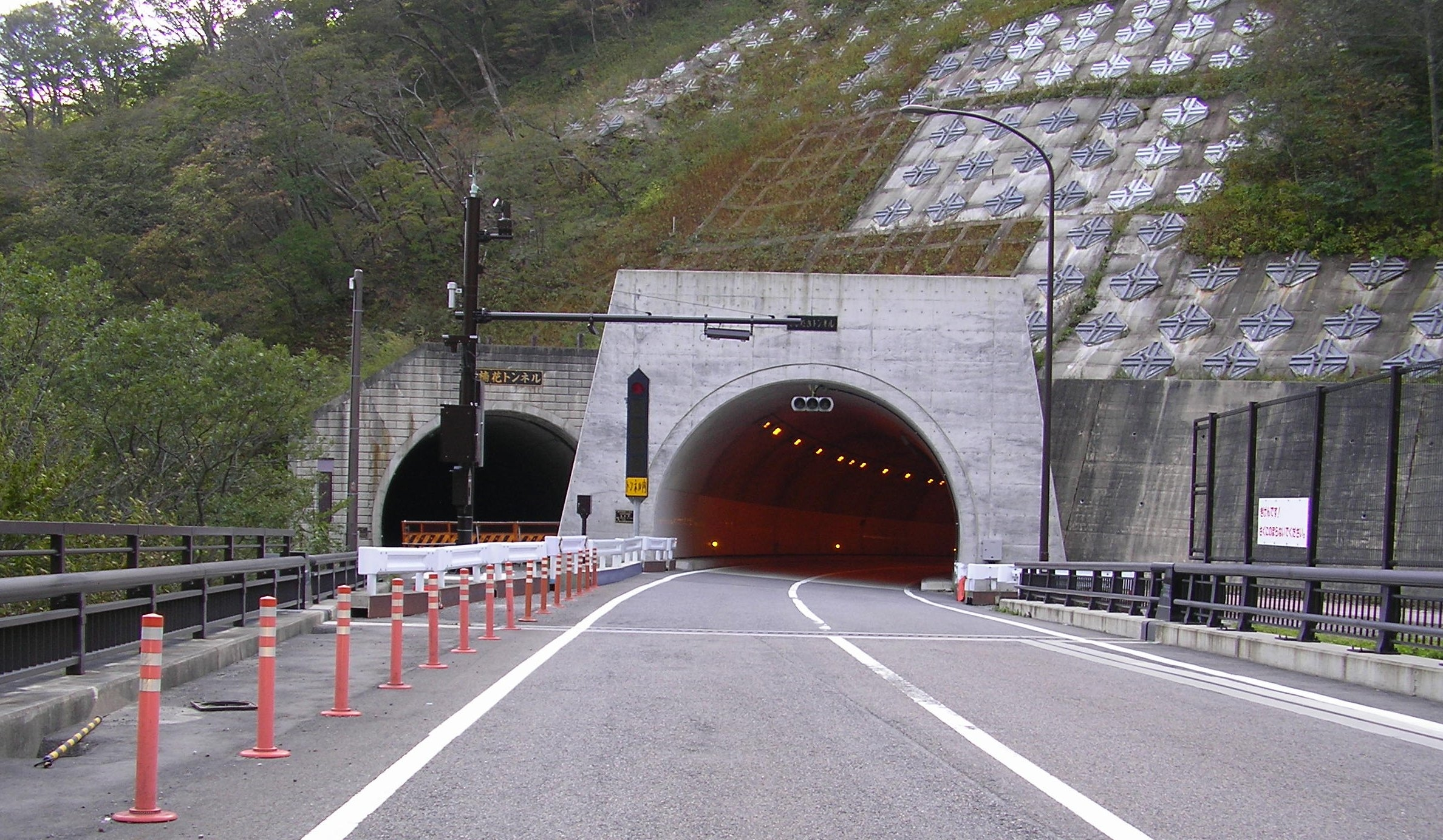 国道289号・甲子道路の きびたきトンネル（右側・現道）と石楠花トンネル（左側・封鎖路）。会津側坑口。福島県西白河郡西郷村。